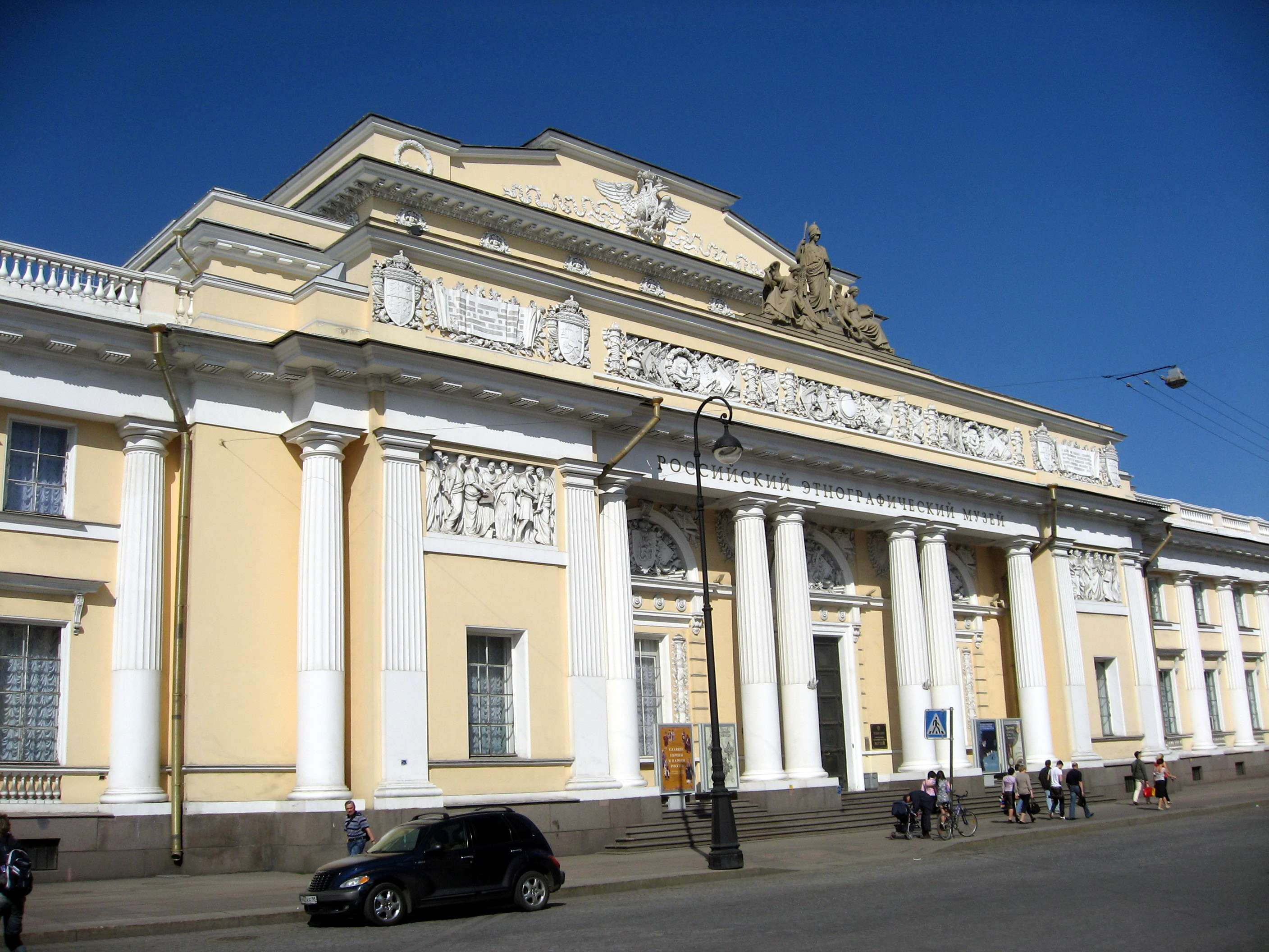 Sankt-Petěrburg